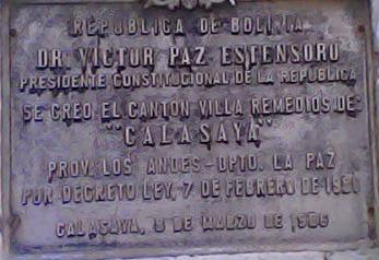 historial de fundacion de la poblacion de Calasaya